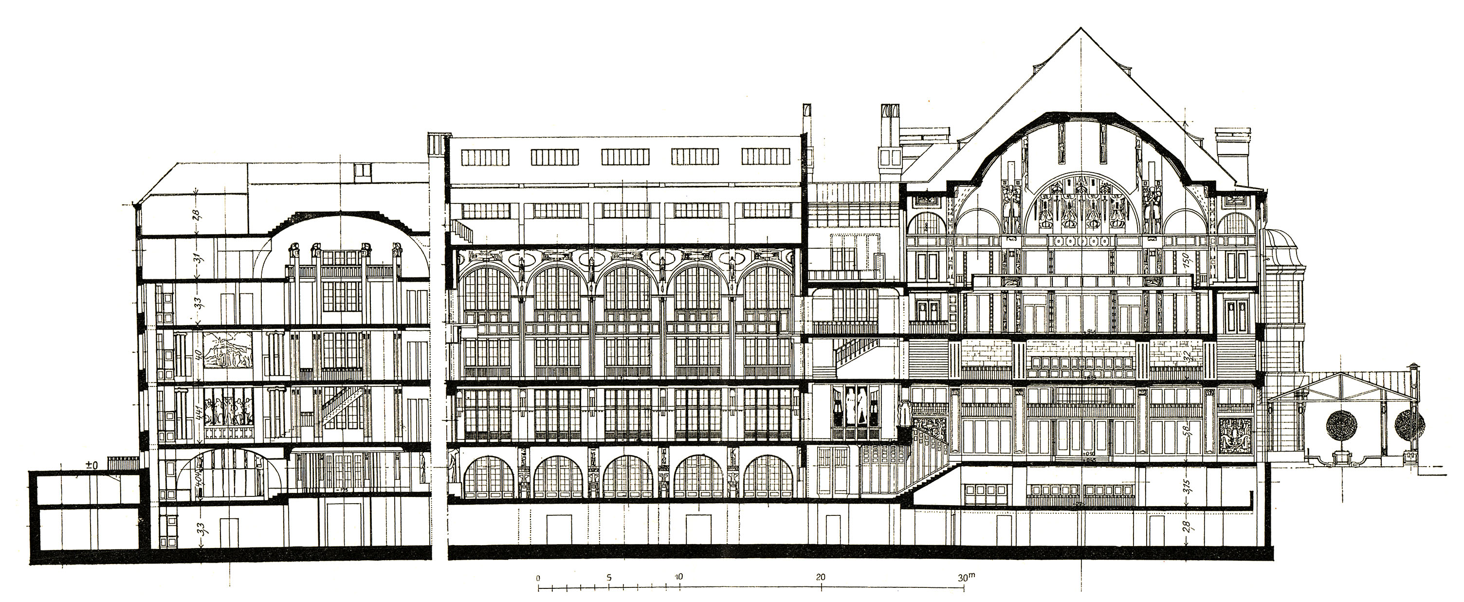 Berlin - Weinhaus Rheingold, Schnitt durch den Verbindungsflügel